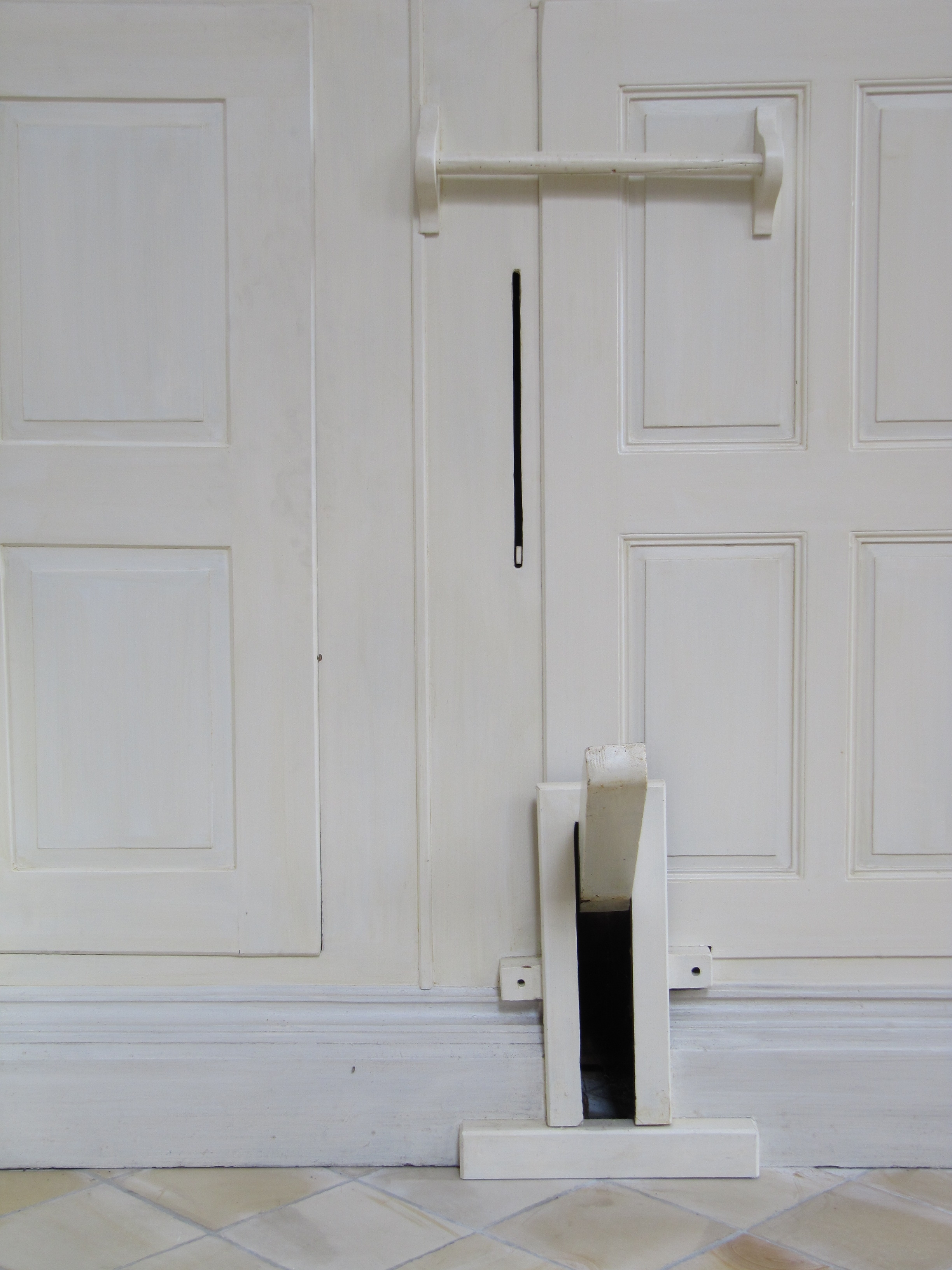 Tretanlage einer Orgel mit Windanzeiger. Mit der Windanzeige konnte der Kalkant den Füllstand des Magazinbalges kontollieren und ggf. öfter oder weniger oft den Schöpfbalg treten.